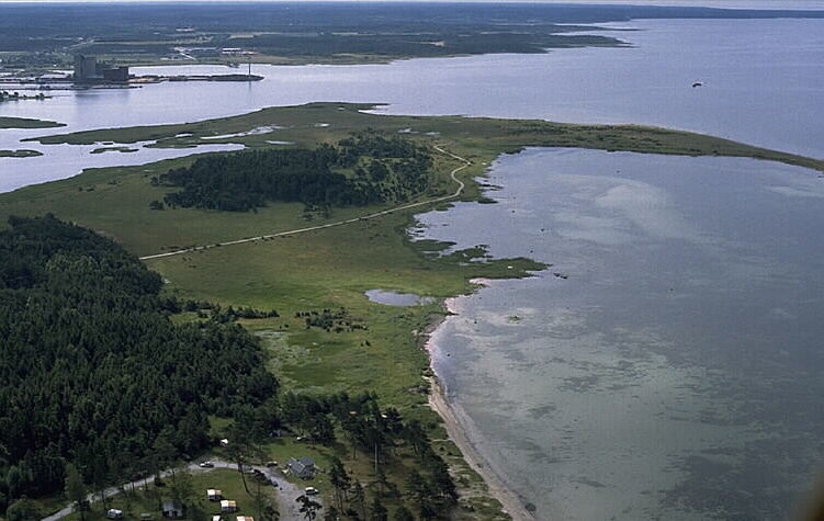 Motiv: Vivesholm Nyckelord: Flygbilder, Riksintressen Kategori: Kust- och skärgårdsmiljöVivesholm